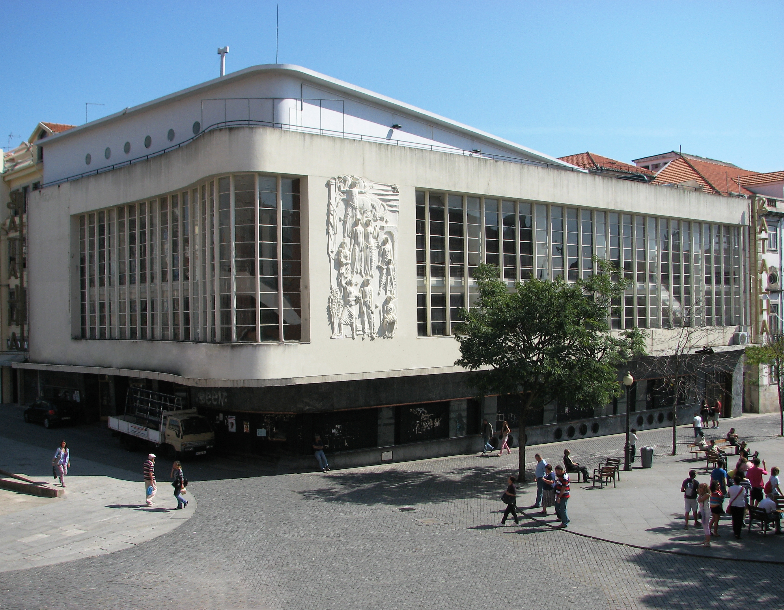 Cinema Batalha This file was uploaded for Wiki Loves Monuments in Portugal with the unique identifier 329677.